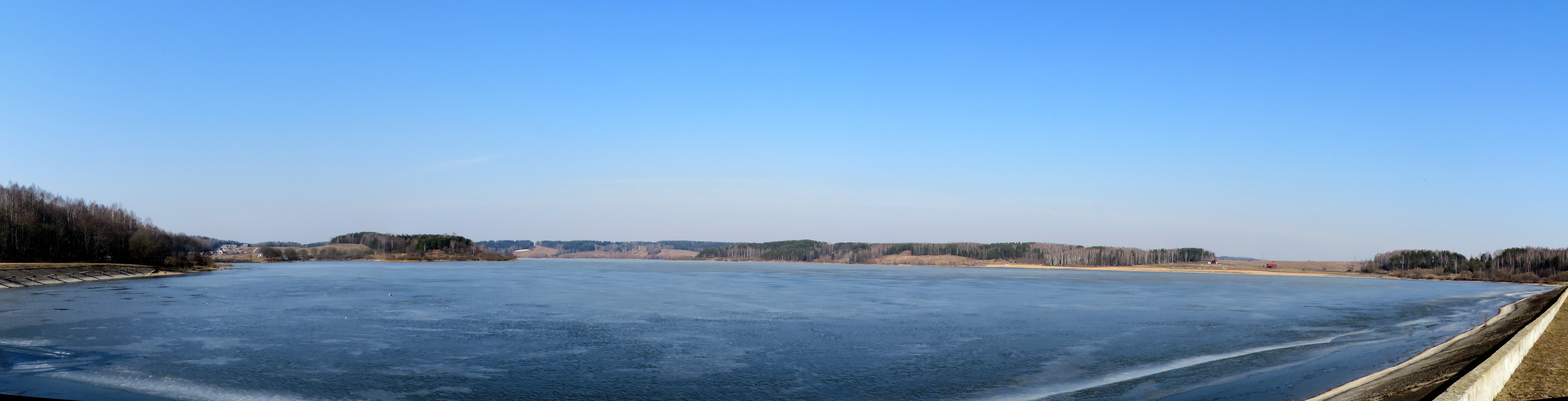 Дуброўскае вадасховішча